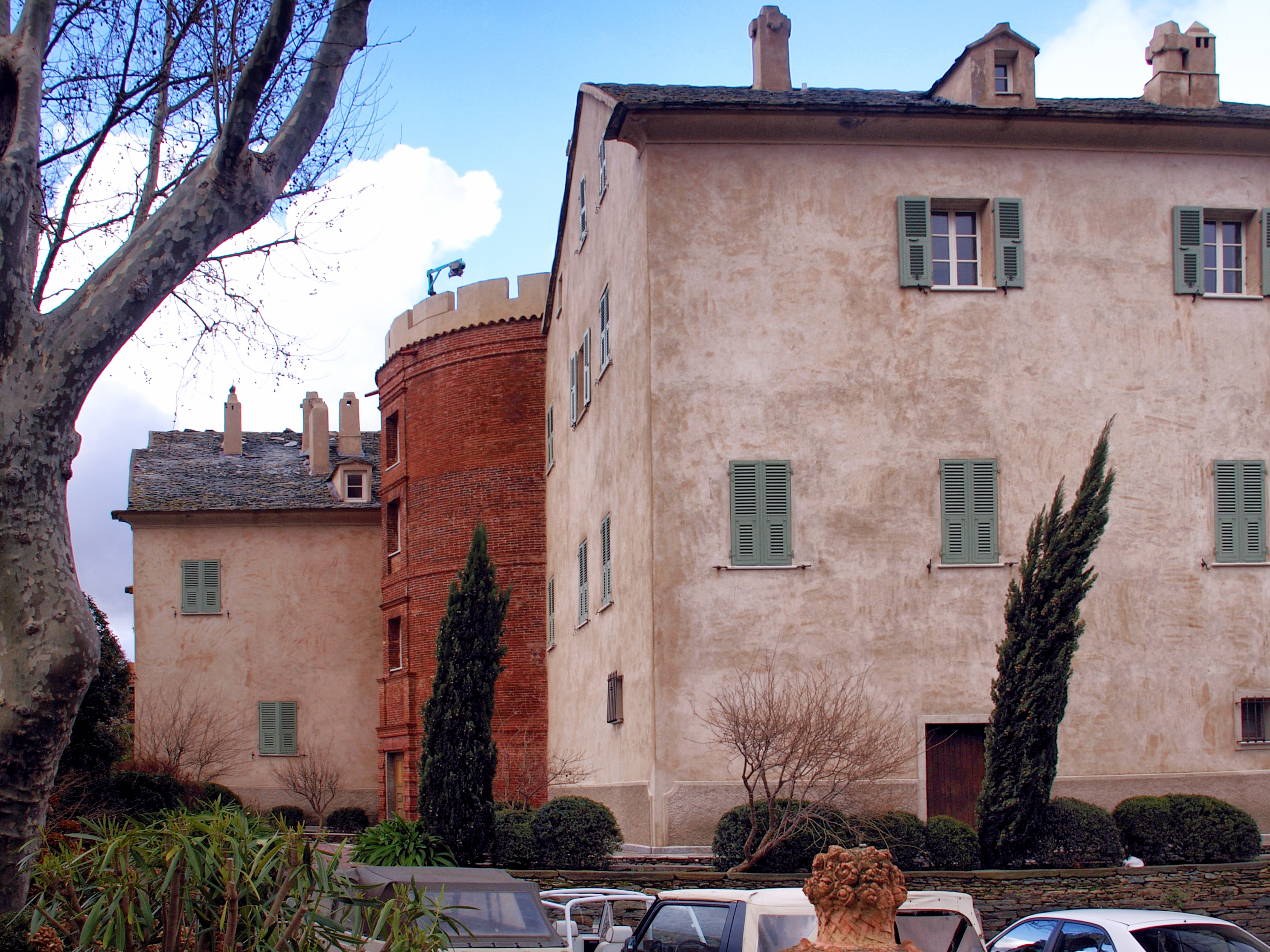 Olmeta-di-Tuda, Nebbio (Corse) - Le château de Tuda, inscrit Monument historique